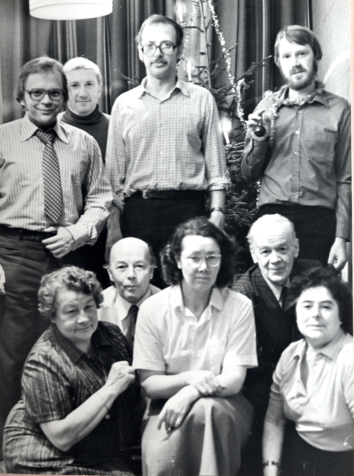 Horisondi toimetuse 1981/1982 aastavahetuse tähistamine. Taga (vasakult): Martin Roogna, Juhan Kivi, Ilmar Palli, Indrek Rohtmets. Ees (vasakult): Maria Saar, Feodor Feodorev, Tiiu Kukk, Boris Murd, Armilde Sagadi.